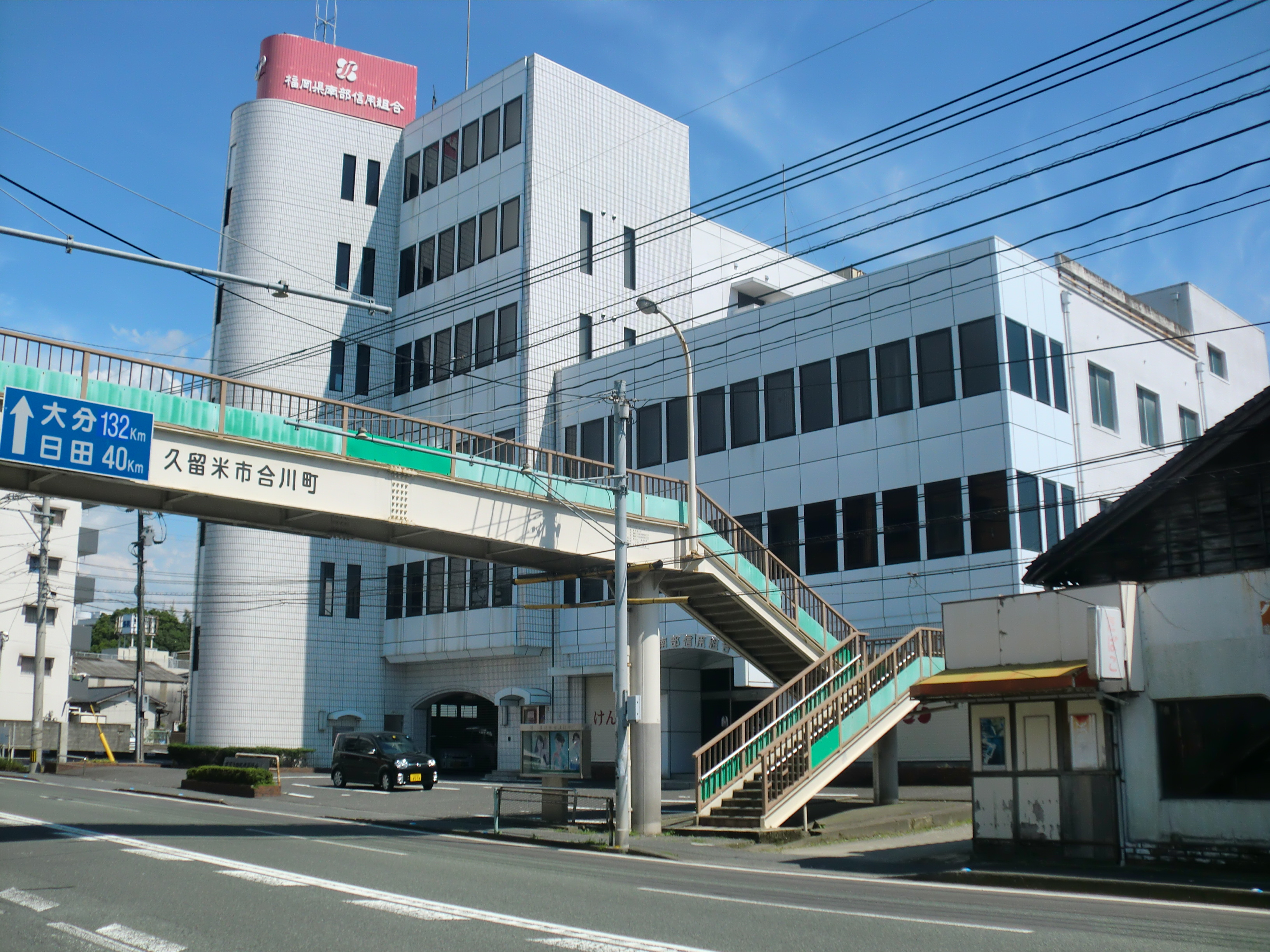 福岡県久留米市にある福岡県南部信用組合